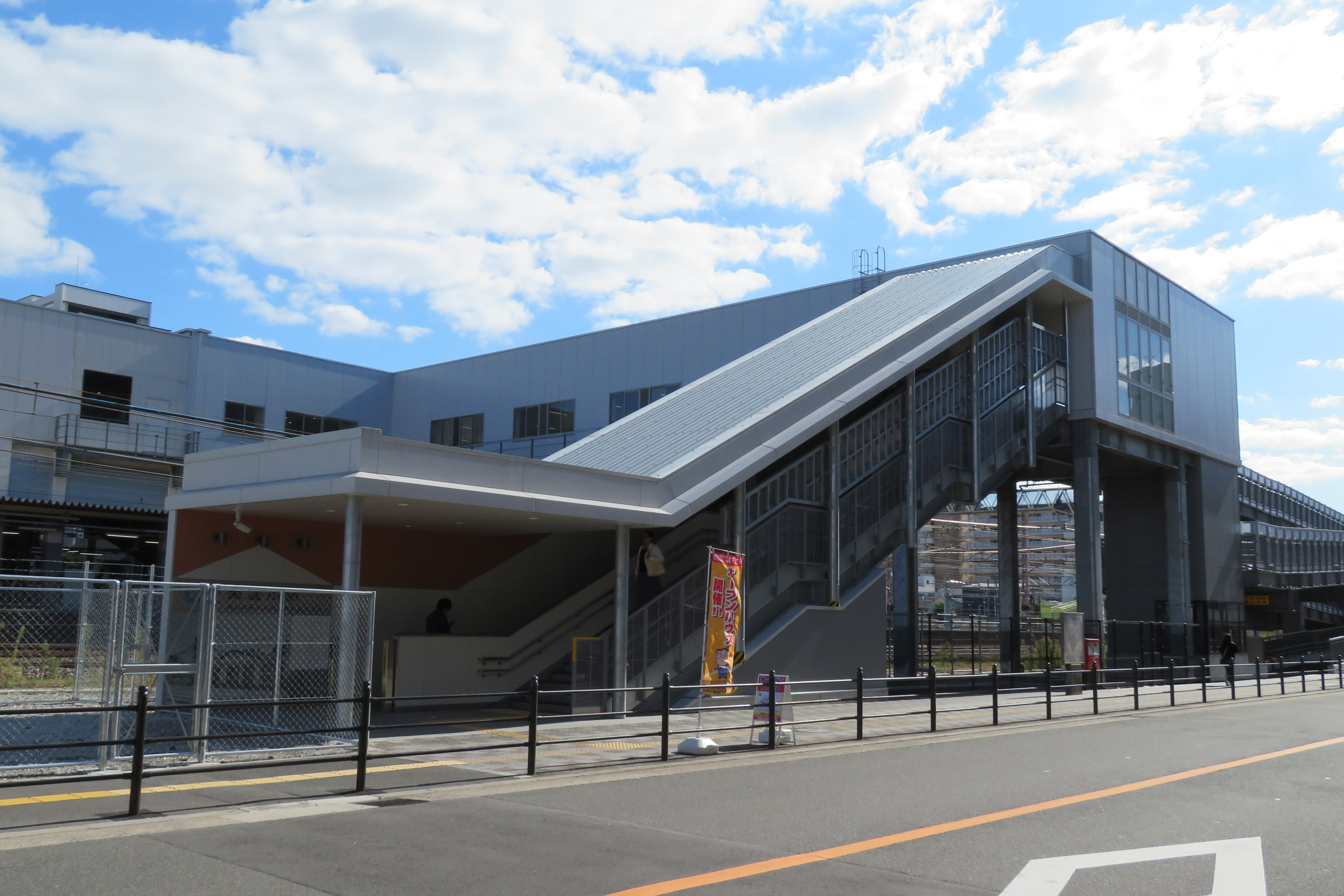 JR東淀川駅西口